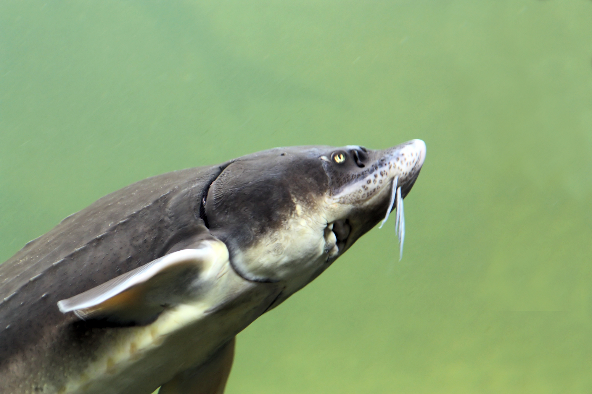 Russischer Stör